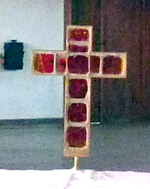 Maria Schutz, Altarkreuz von Alexander Silveri